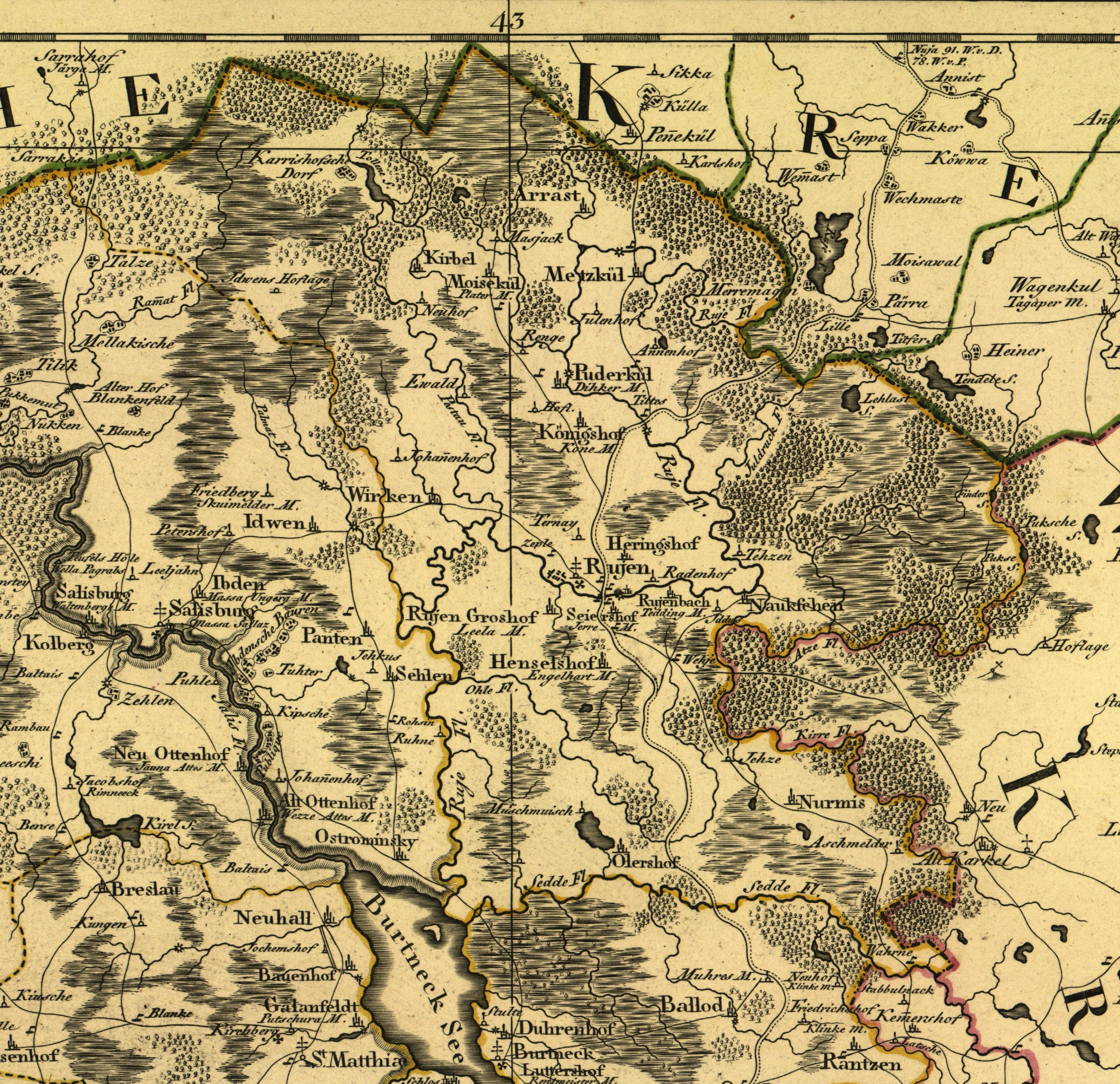 Rūjienas draudzes novads (1798) Izgriezts no Ludwig August Mellin. Atlas von Liefland, oder von den beyden Gouvernementern u. Herzogthümern Lief- und Ehstland, und der Provinz Oesel (1798)